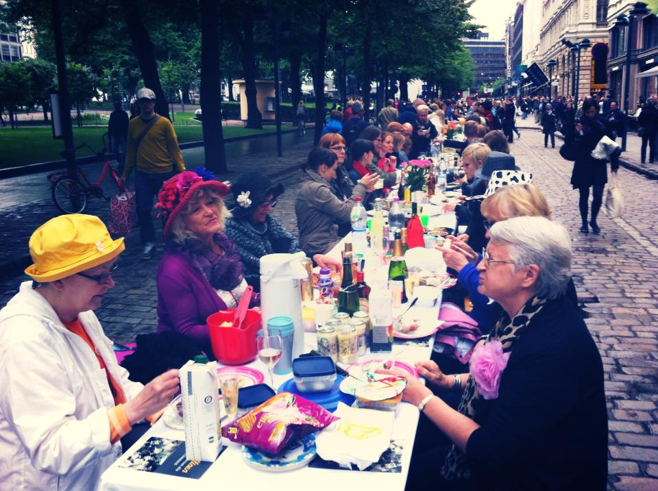 Rouvat illallisella 12.6.2013, Esplanadin puisto, Helsinki